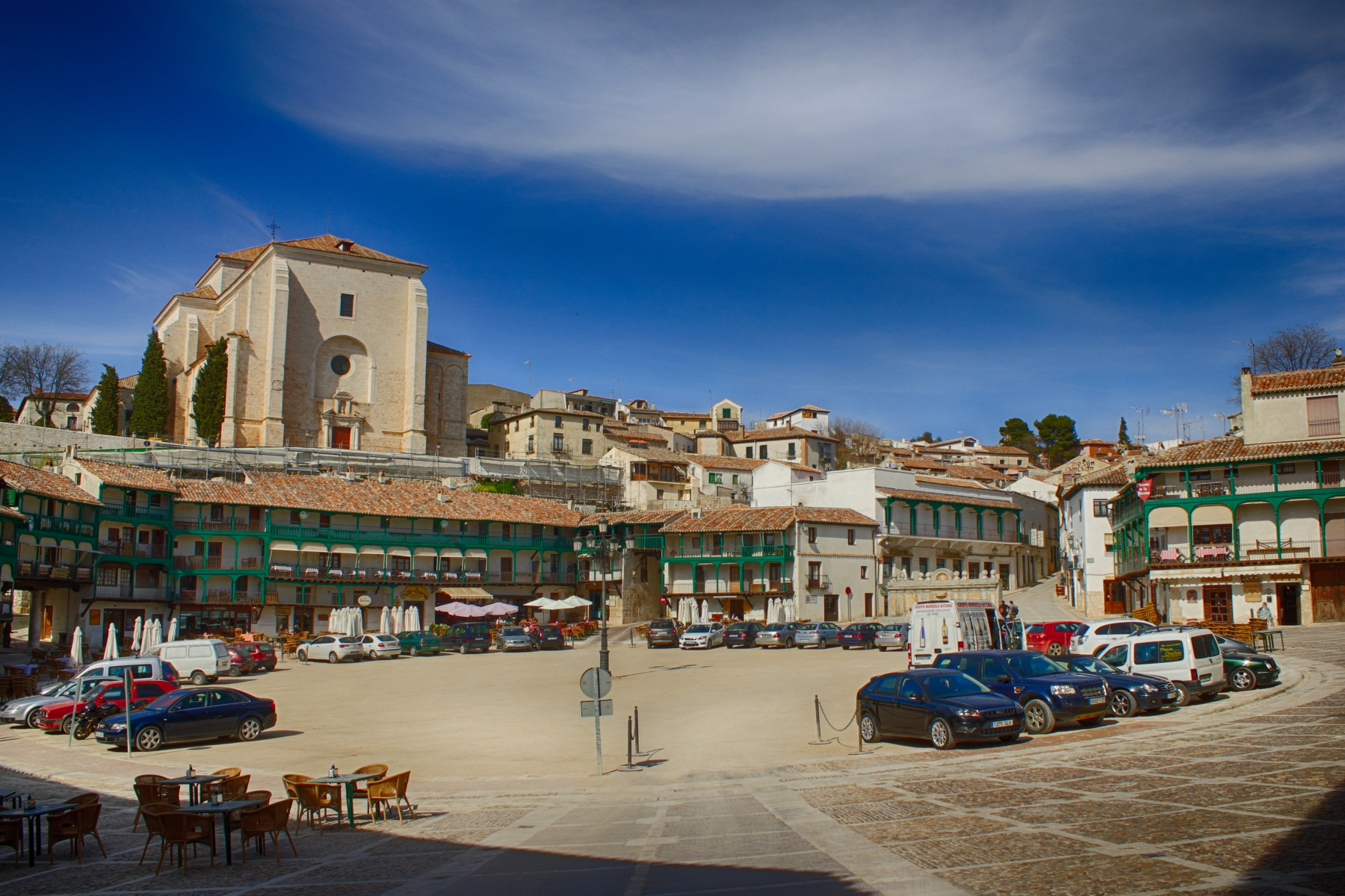 Plaza Mayor, construida entre los siglos XV y XVII Chinchón Comunidad de Madrid España